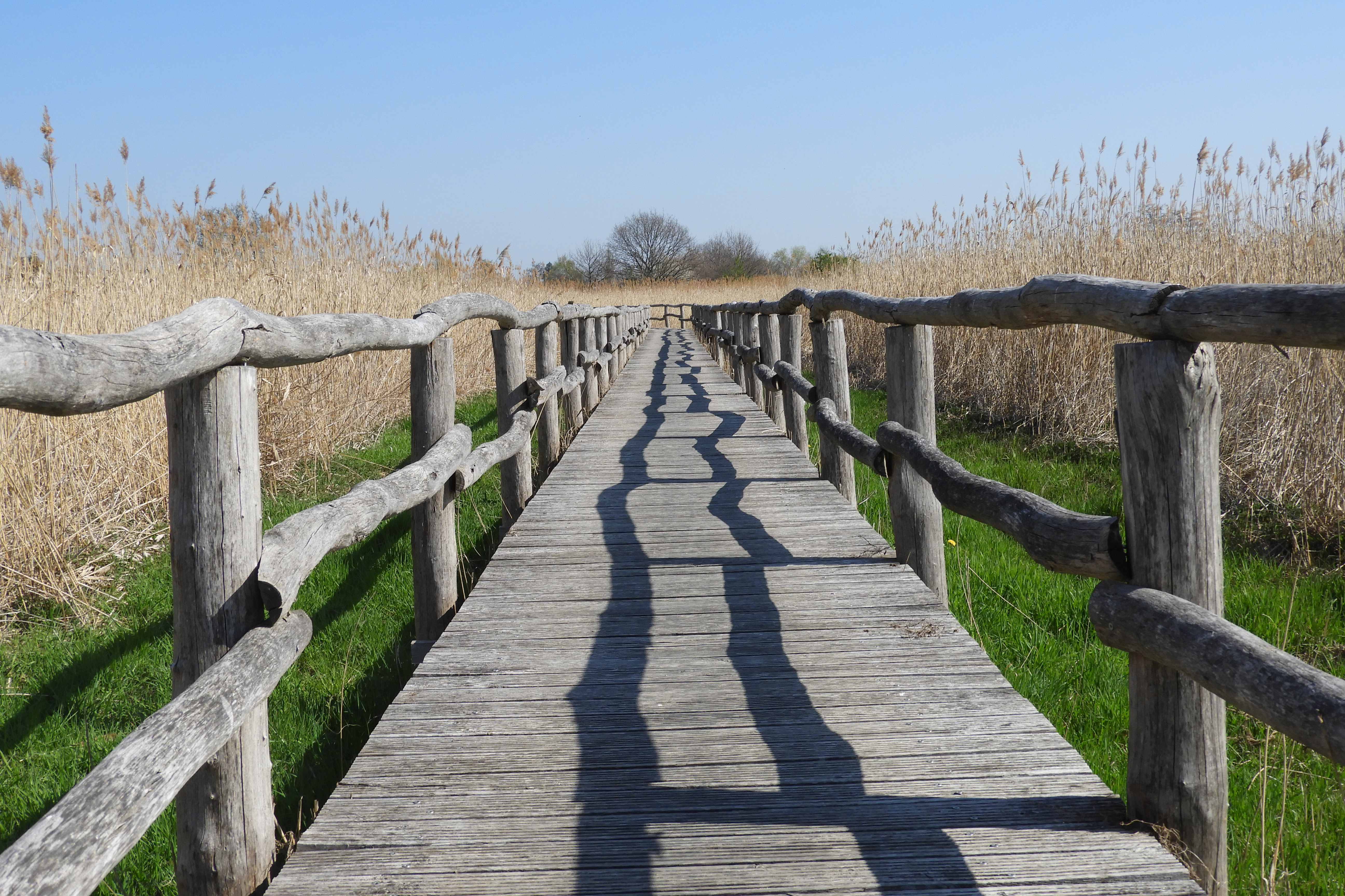 Die „Rohrlache von Heringen“ liegt in den Gemarkungen der Ortsteile Widdershausen, Leimbach und Heringen der Stadt Heringen im osthessischen Landkreis Hersfeld-Rotenburg. Der Auenbereich im Werratal, in der Nähe der Landesgrenze zu Thüringen, besitzt eine artenreiche Salzflora von hoher ökologischer Bedeutung. Hier ist mit Salzpfannen und Salzwiesen eine der größten Salzstellen des Binnenlands. Bemerkenswert ist die hohe Zahl von Vogelarten, die die Rohrlache als Brut- und Rastplatz sowie als Gebiet für die Nahrungssuche nutzen. Die Rohrlache wird als ein seltenes Beispiel für einen schützenswerten Landschaftsbereich angesehen, bei dessen Entwicklung natürliche Ursachen mit den Auswirkungen industrieller Tätigkeit zusammenwirkten. Im Juli 1979 wurde die Rohrlache zum Naturschutzgebiet erklärt. Seit 2008 gehört der Bereich als Flora-Fauna-Habitat-Gebiet mit der Nummer 5026-301 und als ein Teil des EU-Vogelschutzgebiets 5026-402 „Rhäden von Obersuhl und Auen an der mittleren Werra“ zu dem europäischen Schutzgebietsnetzwerk Natura 2000. Außerdem liegt die Rohrlache in dem im Jahr 1992 ausgewiesenem Landschaftsschutzgebiet „Auenverbund Werra“. This is a picture of the protected area listed at WDPA under the ID 82435